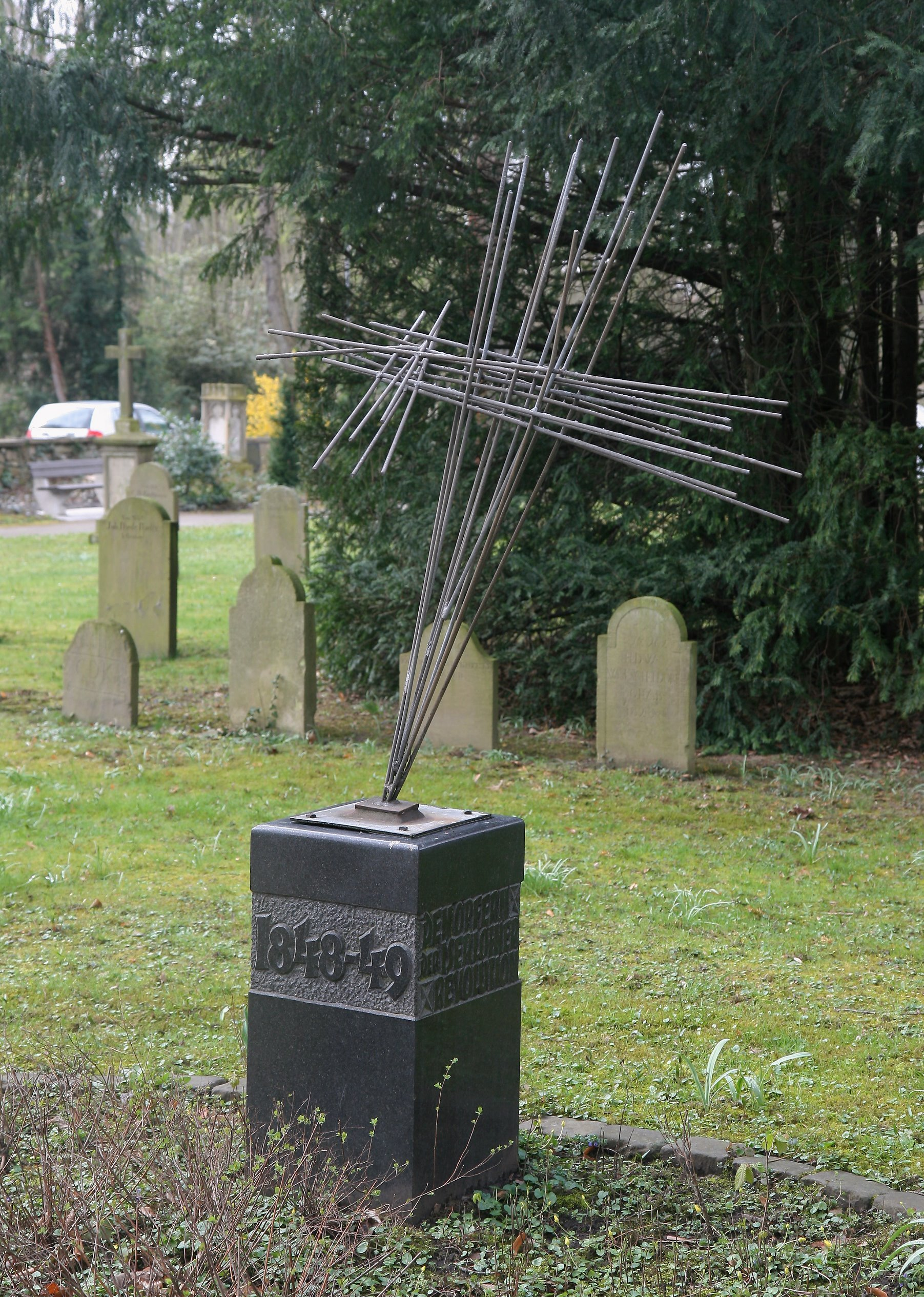 Denkmal für die Opfer der Iserlohner Revolution 1848/1849 auf dem Hauptfriedhof in Iserlohn, Oestricher Straße.